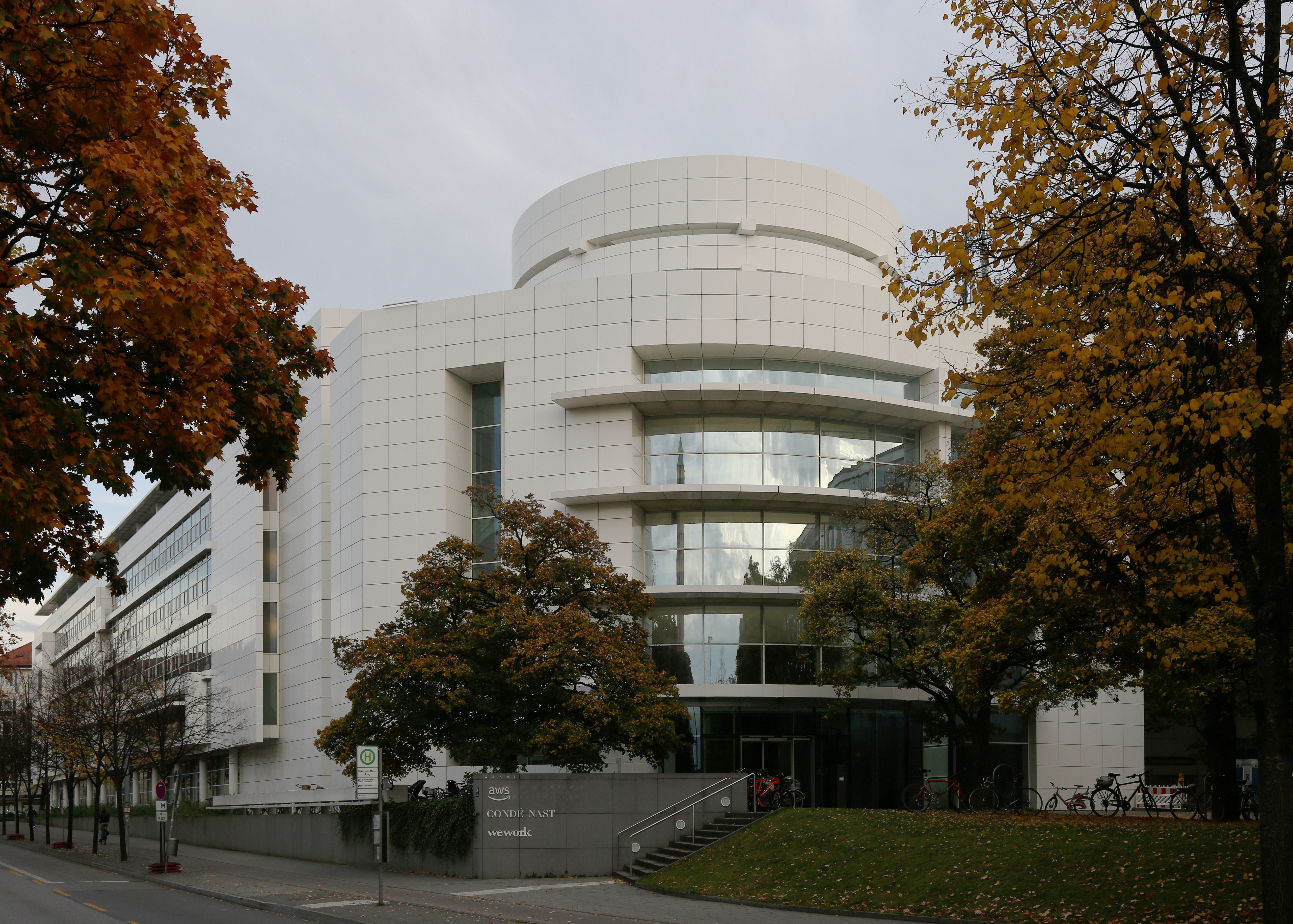 Oskar-von-Miller-Ring 20 , München. Ein Bürogebäude von Architekt Richard Meier aus dem Jahr 1999. Ursprünglich für die Siemens AG errichtet, im Jahr 2019 Sitz von Conde-Nast, Amazon Web Services und WeWorks. Das Bild zeigt das Gebäude von Westen mit dem gebogenen Schild, der die Eingangsrotunde umschließt und der Nordfassade.